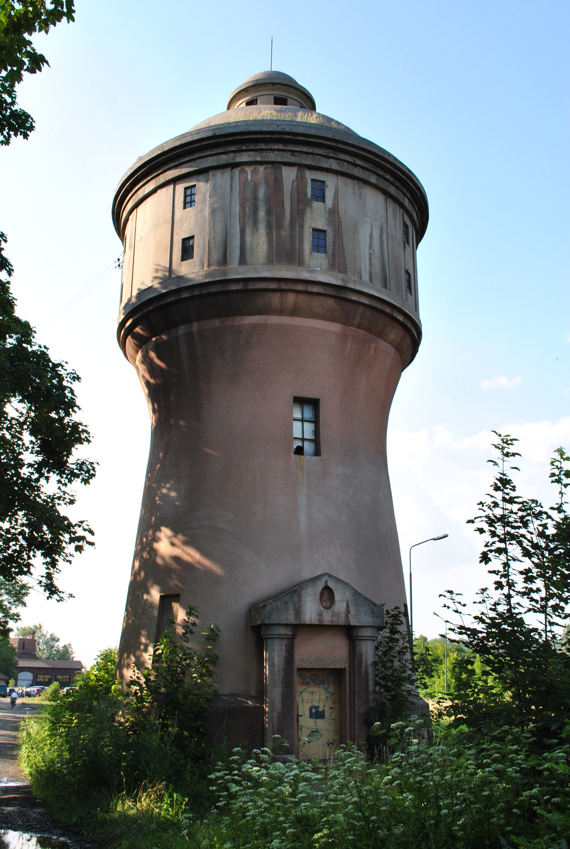 Wireża wodna na stacji Lwówek Śląski